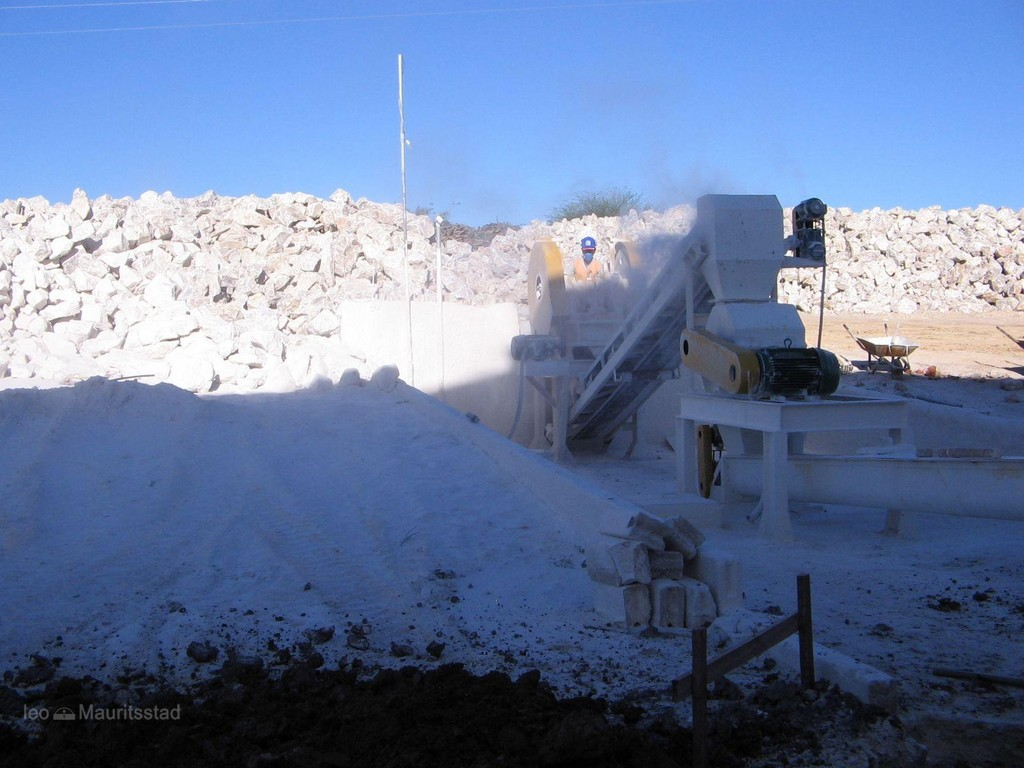 Fabrique de plâtre aux environs de Trinidad, Cuba.